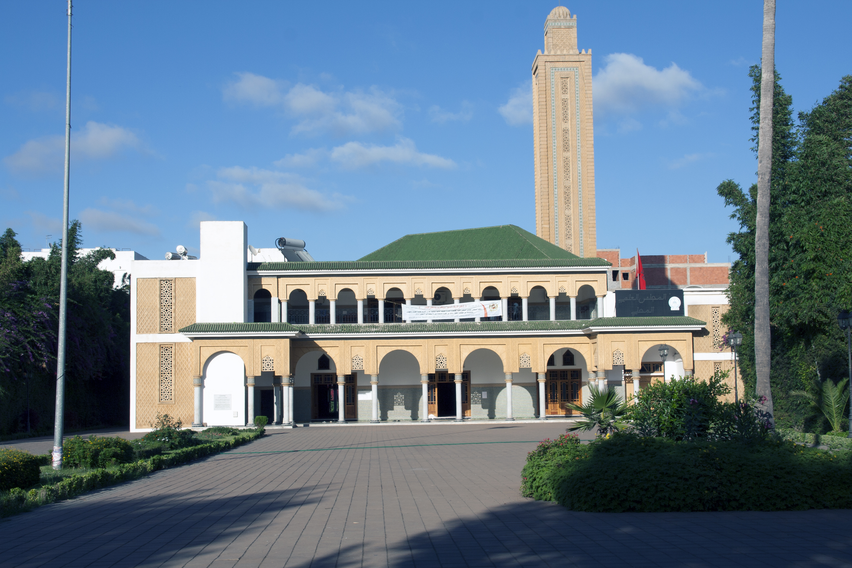 Ville de Kénitra.